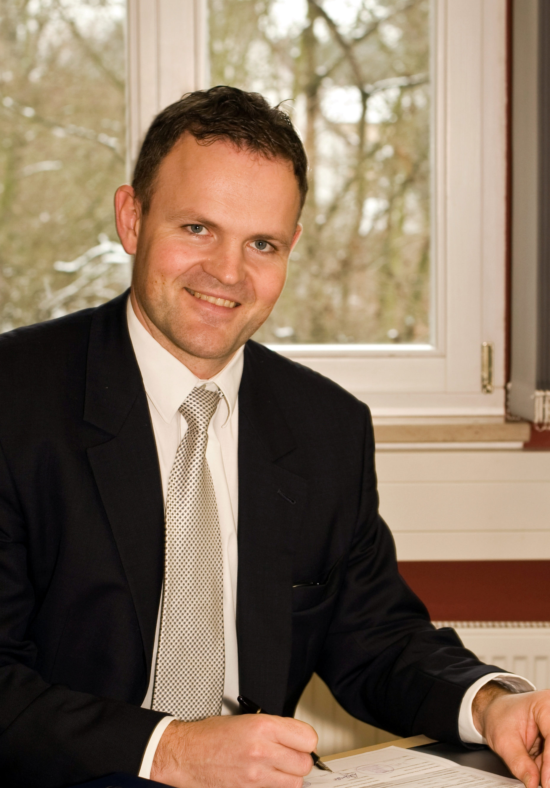 Präsident FH Nordhausen Prof. Dr. Jörg Wagner